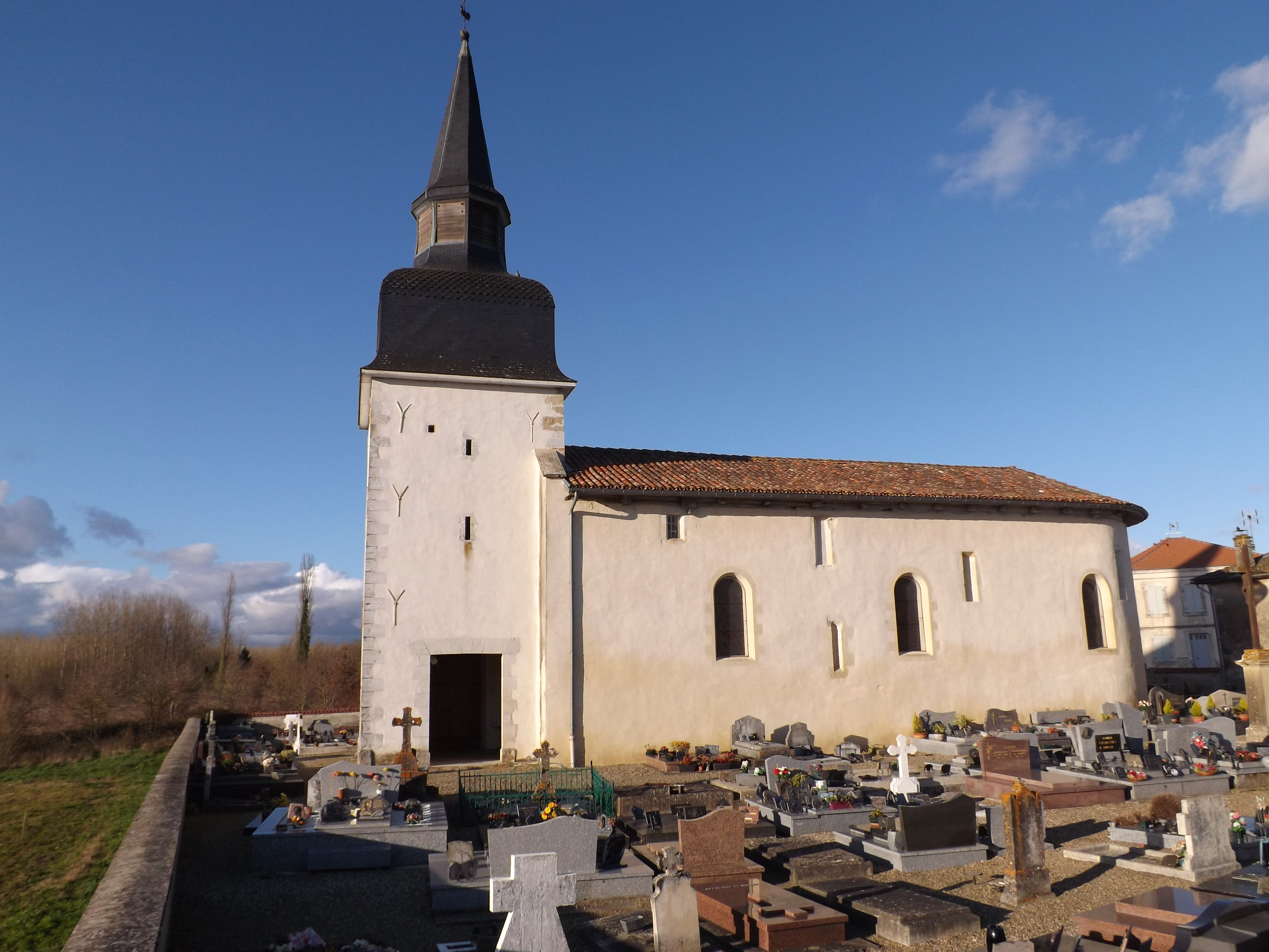 Glèisa de Sent Joan Baptista de Preishac, Lanas, Gasconha